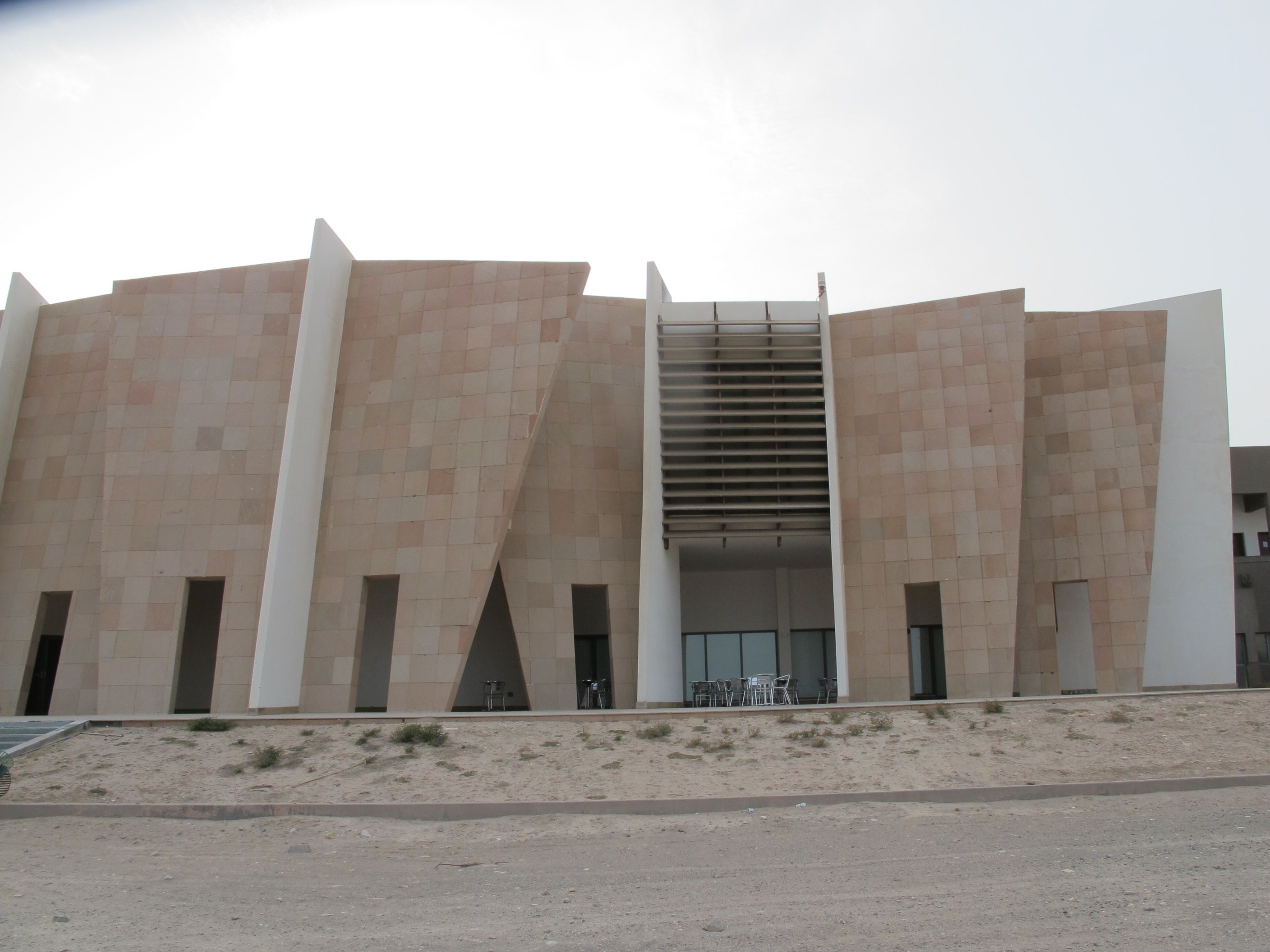 Ras al-Jinz, Oman.